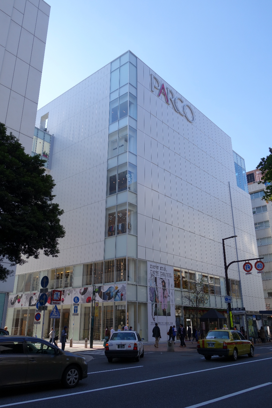 福岡市中央区天神 商業施設「福岡パルコ新館」